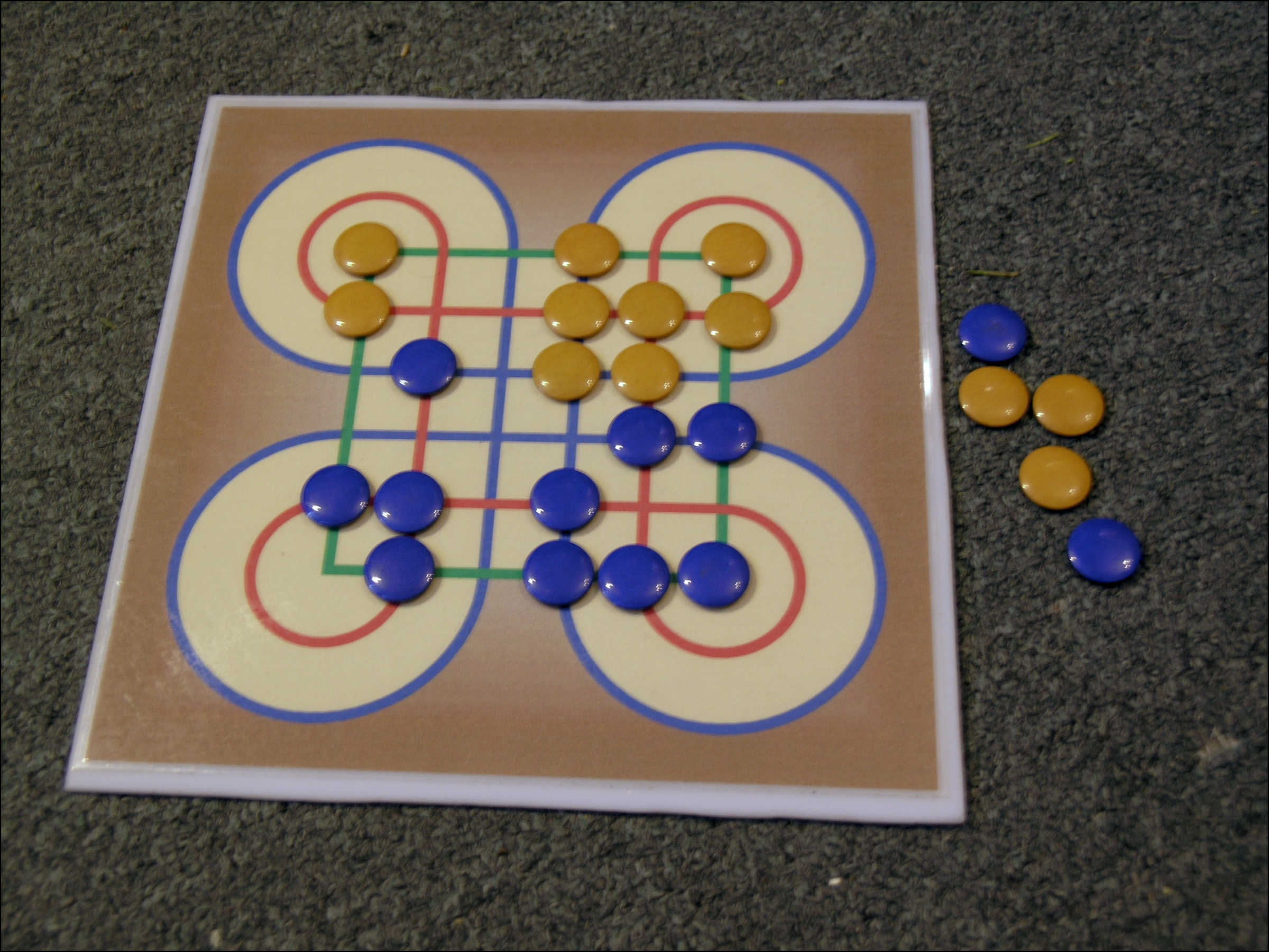 Surakarta